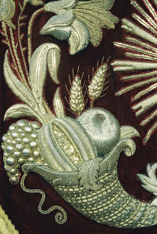 Detail koorkap F. Stoltzenberg circa 1845-1850